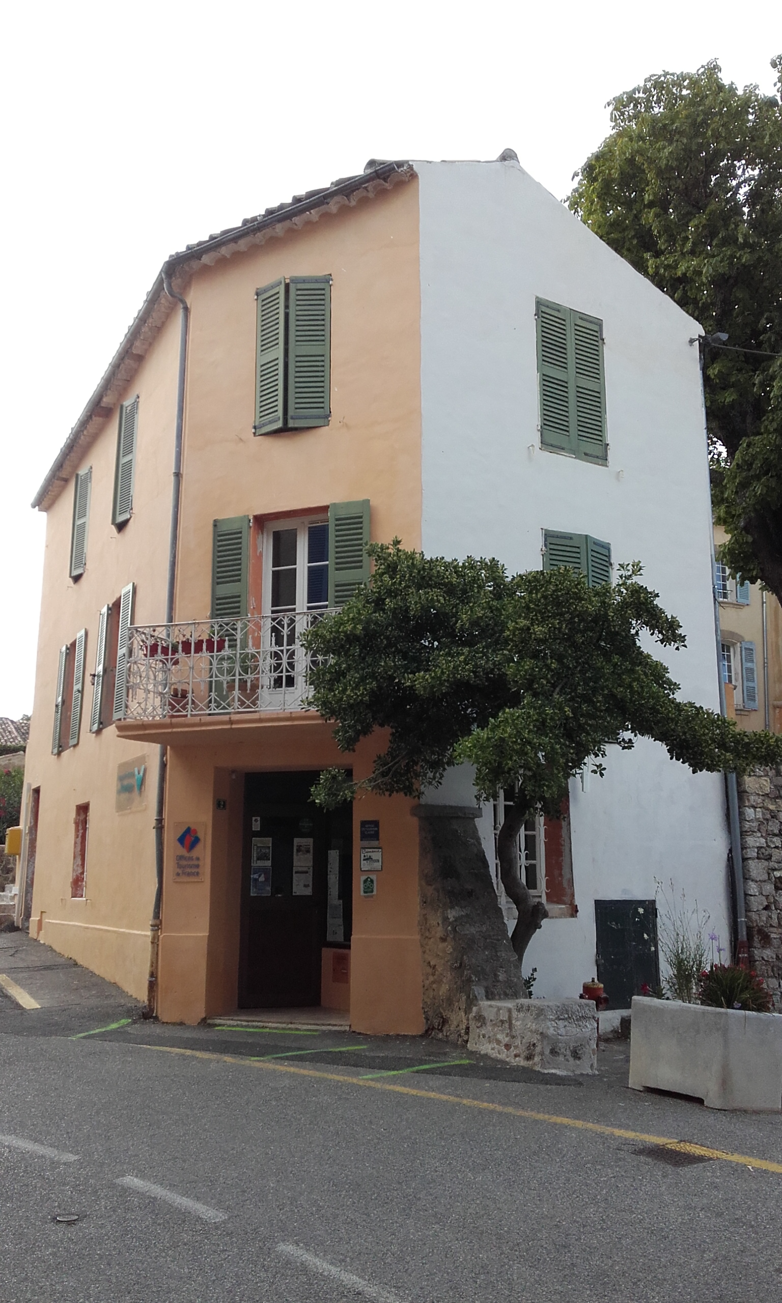 Var, Tourtour, Nouveaux locaux du bureau d'information touristique de la "Communauté de communes Lacs et gorges du Verdon", 2 place de la Trinité